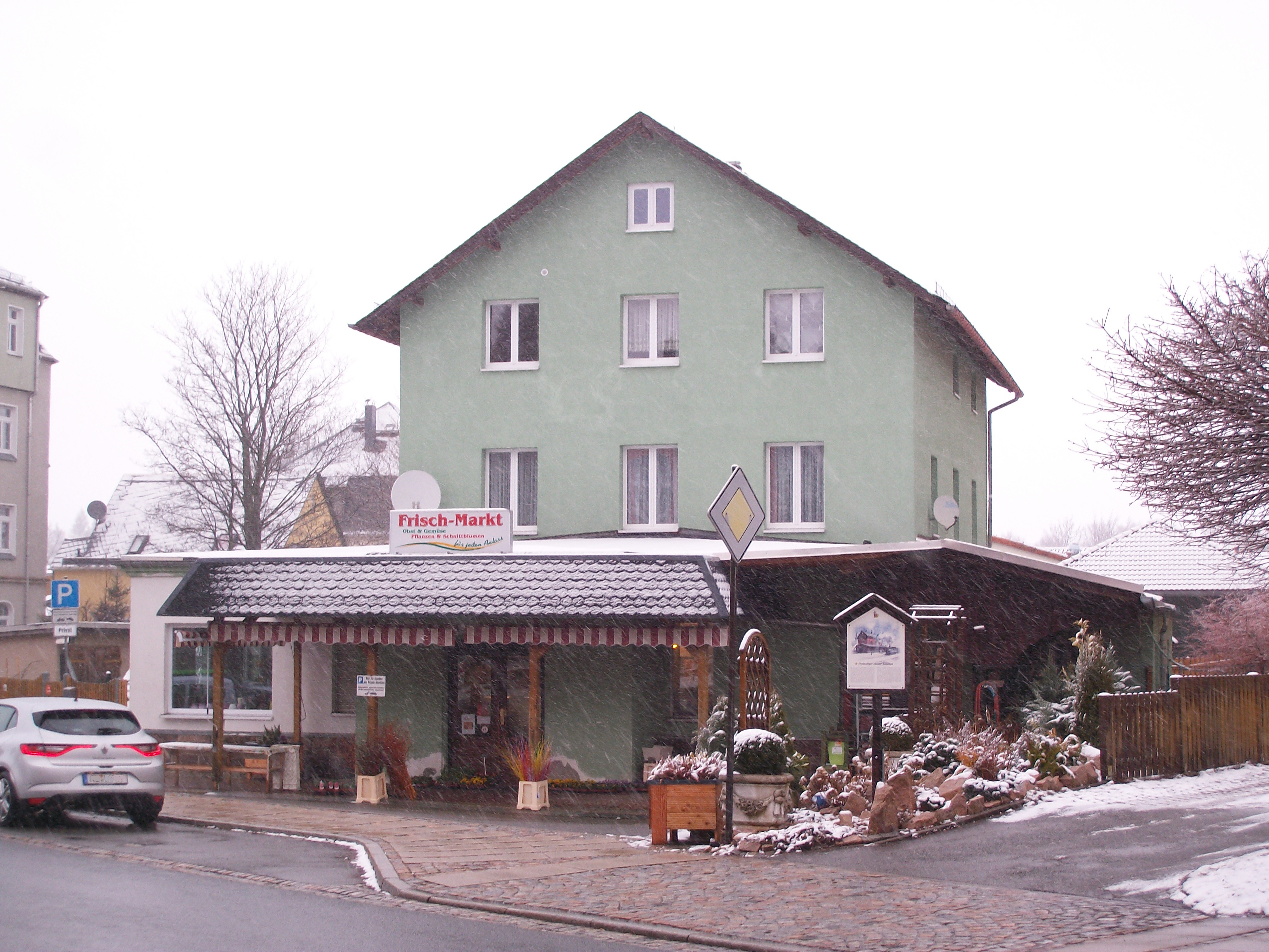 Eibenstock ob Bf, Seitenansicht (2017)